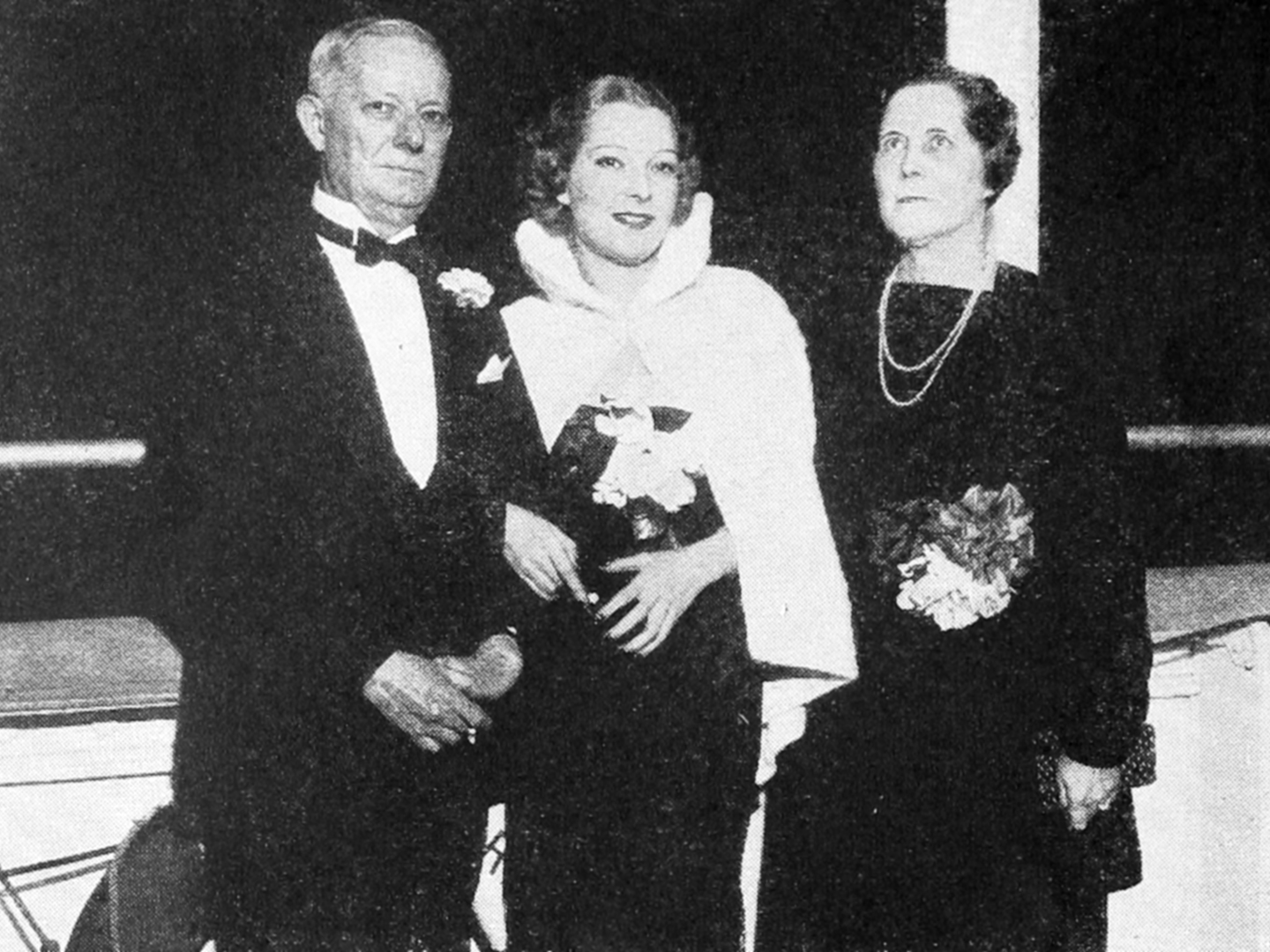 Helen Vinson and Parents